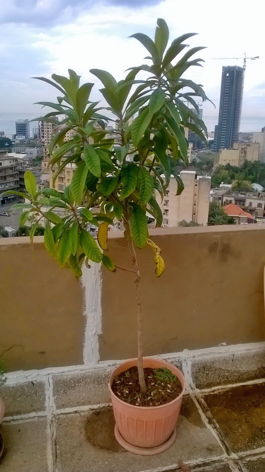 Նորաշխարհի ծառ աճեցված ծաղկամանում